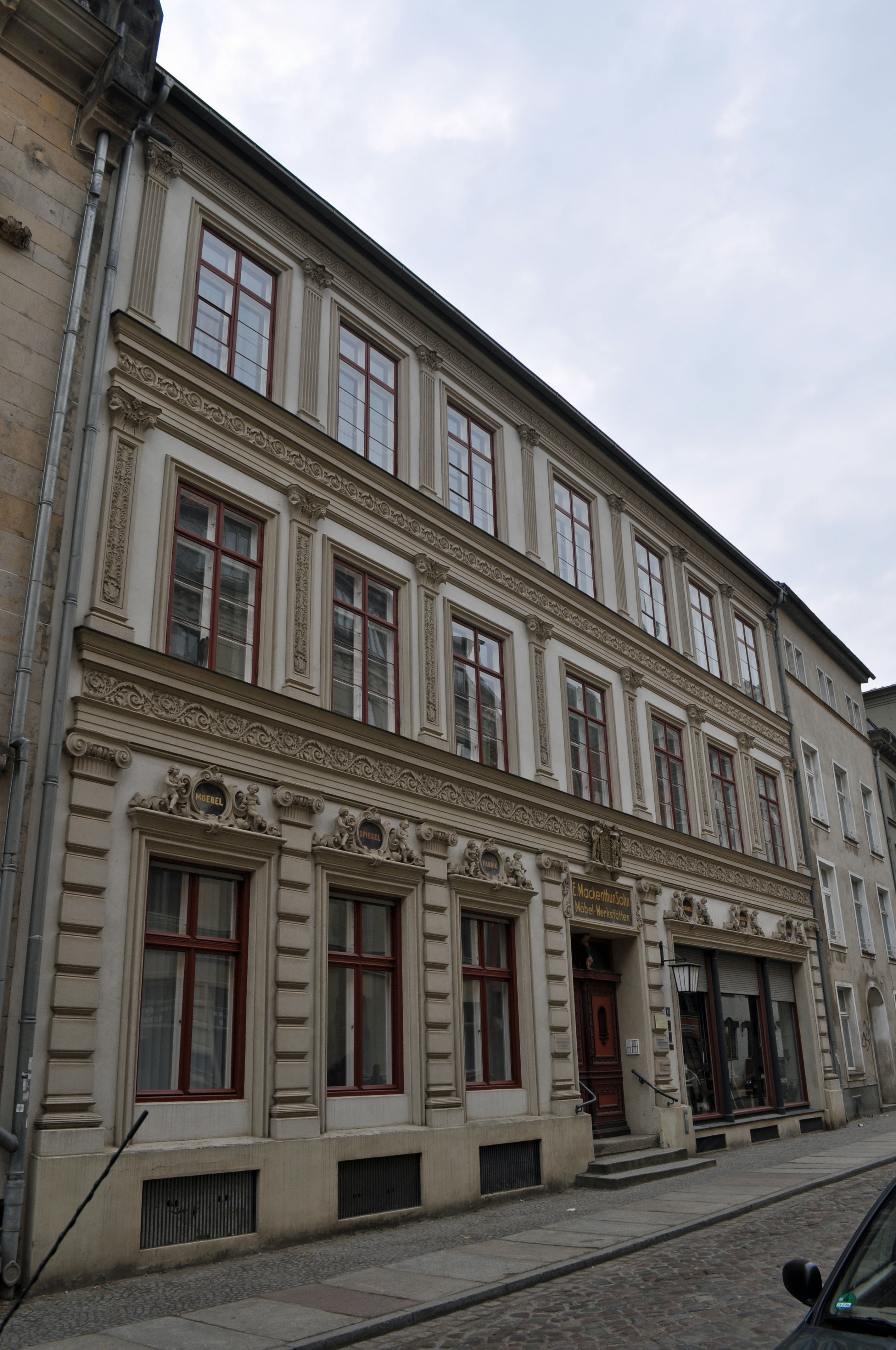 Gebäude bzw. Gebäudedetail in Stralsund. Straße und Hausnummer siehe Dateiname.